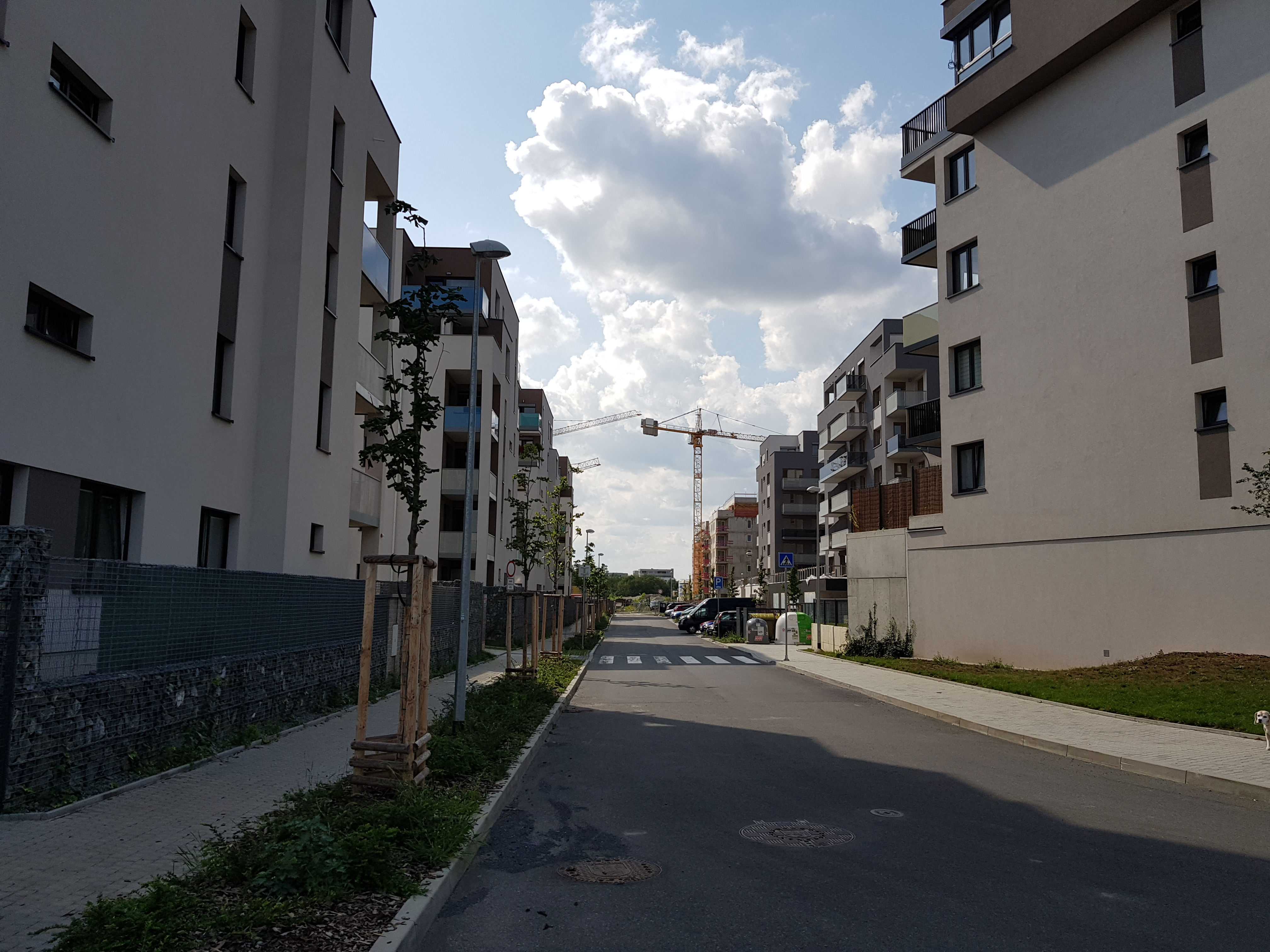 Ulice Saarinenova, Suomi Hloubětín, pohled západním směrem, Praha 9-Hloubětín